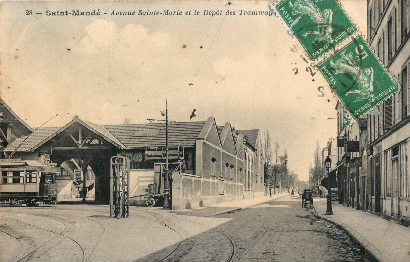 Carte postale sans mention d'éditeur, n°28 : SAINT-MANDÉ - Avenue Sainte-Marie et Dépôt des Tramways